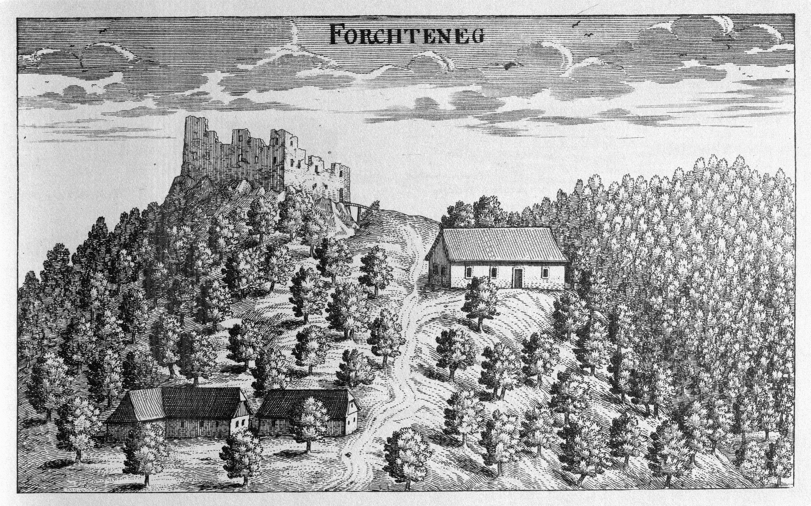 G. M. Vischers Käyserlichen Geographi, Topographia Ducatus Stiriae, Das ist: Eigentliche Delineation / und Abbildung aller Städte / Schlösser / Marcktfleck / Lustgärten / Probsteyen / Stiffter / Clöster und Kirchen / so es sich im Herzogthumb Steyrmarck befinden; Und anjetzo Umb einen billichen Preyß zu finden seynd Bey Johann Bitsch Universitäts Buchhandlern / Auff dem Juden=Platz bey der guldenen Saulen. Graz 1681 Die Nummerierung der Dateien folgt der alphabetischen Reihung der Orte